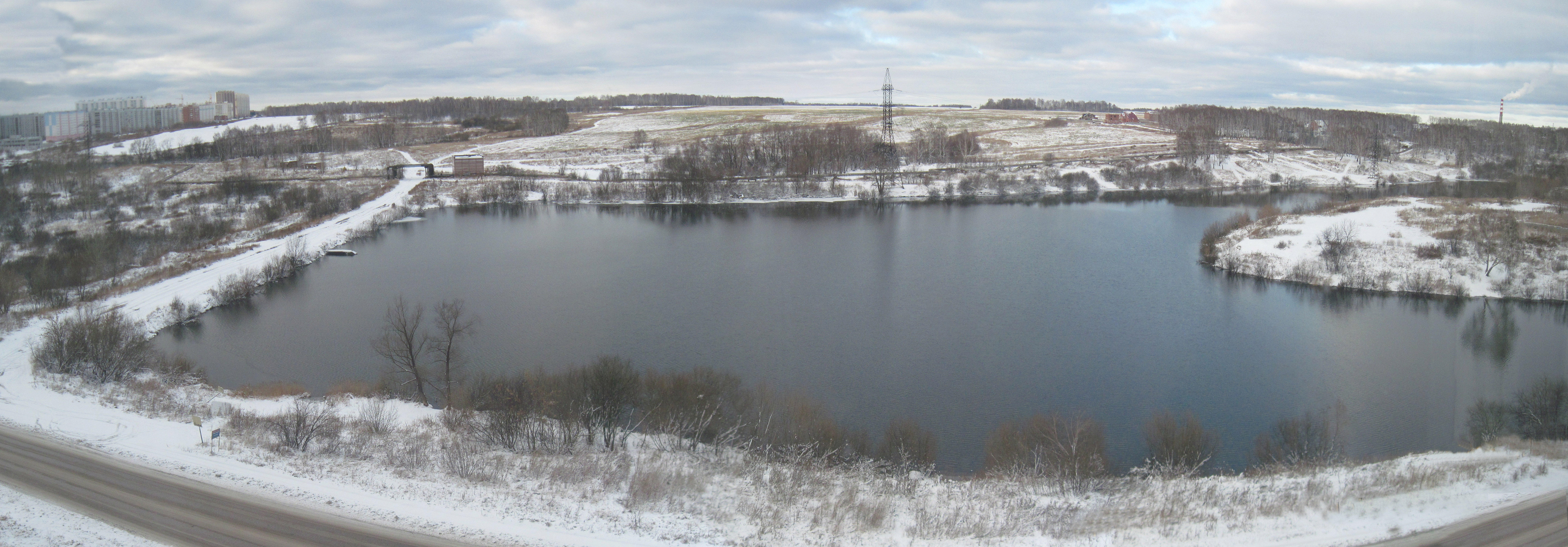 Панорама озера "Спартак" жилмассив Снегири, Новосибирск, Россия